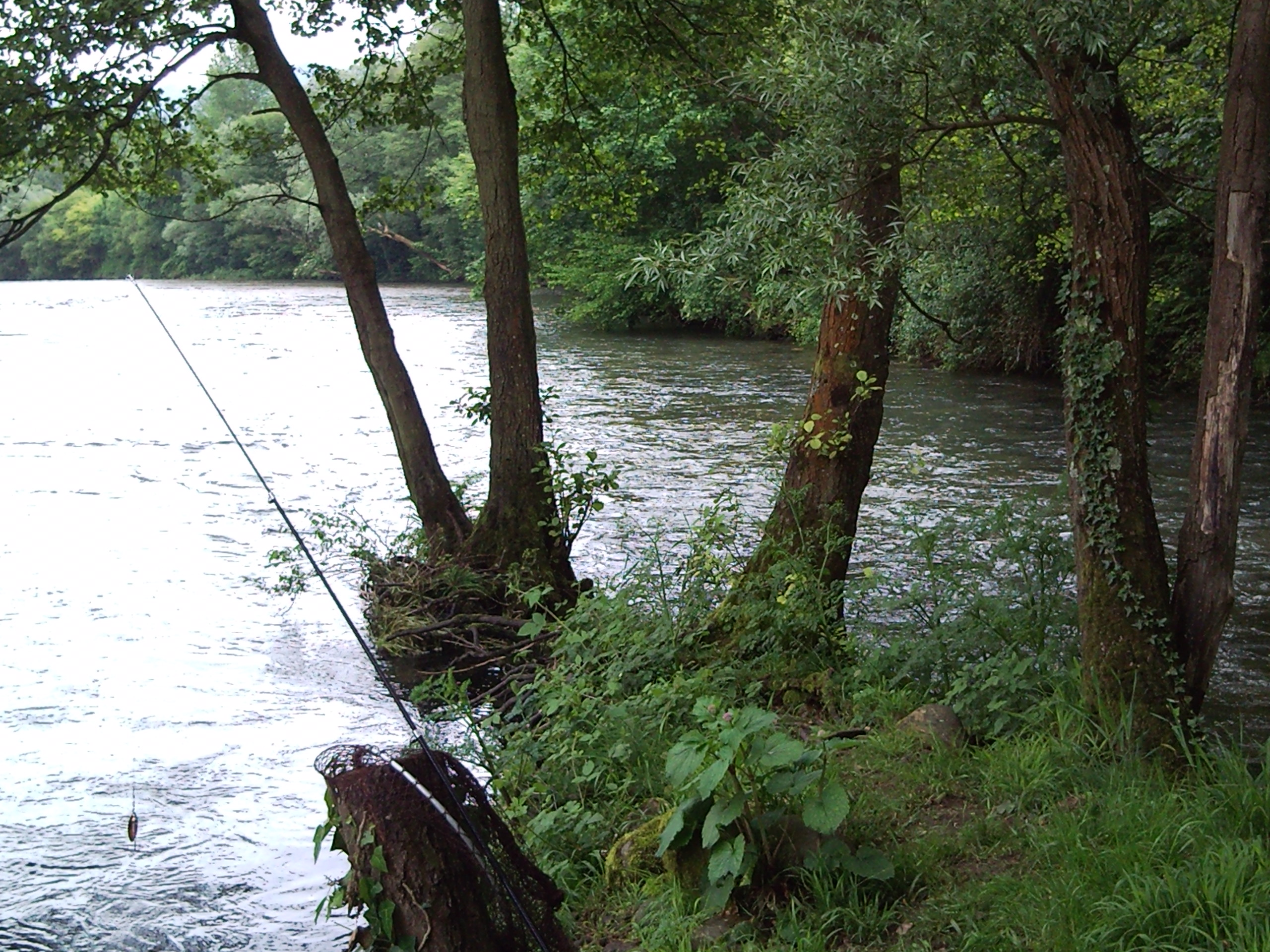 Desembocadura del río Pigüeña en el río Narea